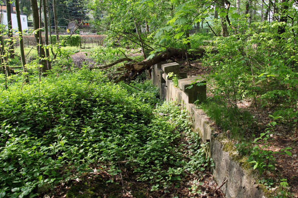 Reste der Beckenanlage des ehemaligen Familienbads in Liegau-Augustusbad am Grundmühlenweg